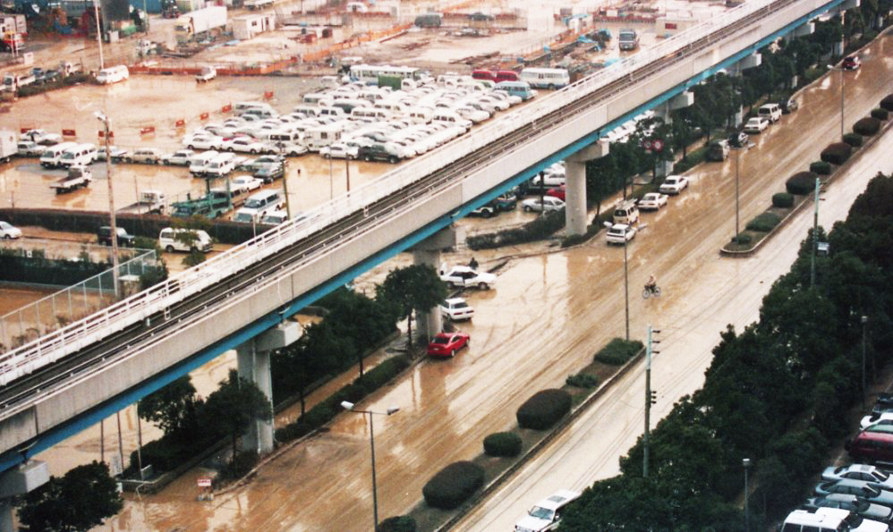 港島中町1丁目周辺 液状化（1995年1月17日）